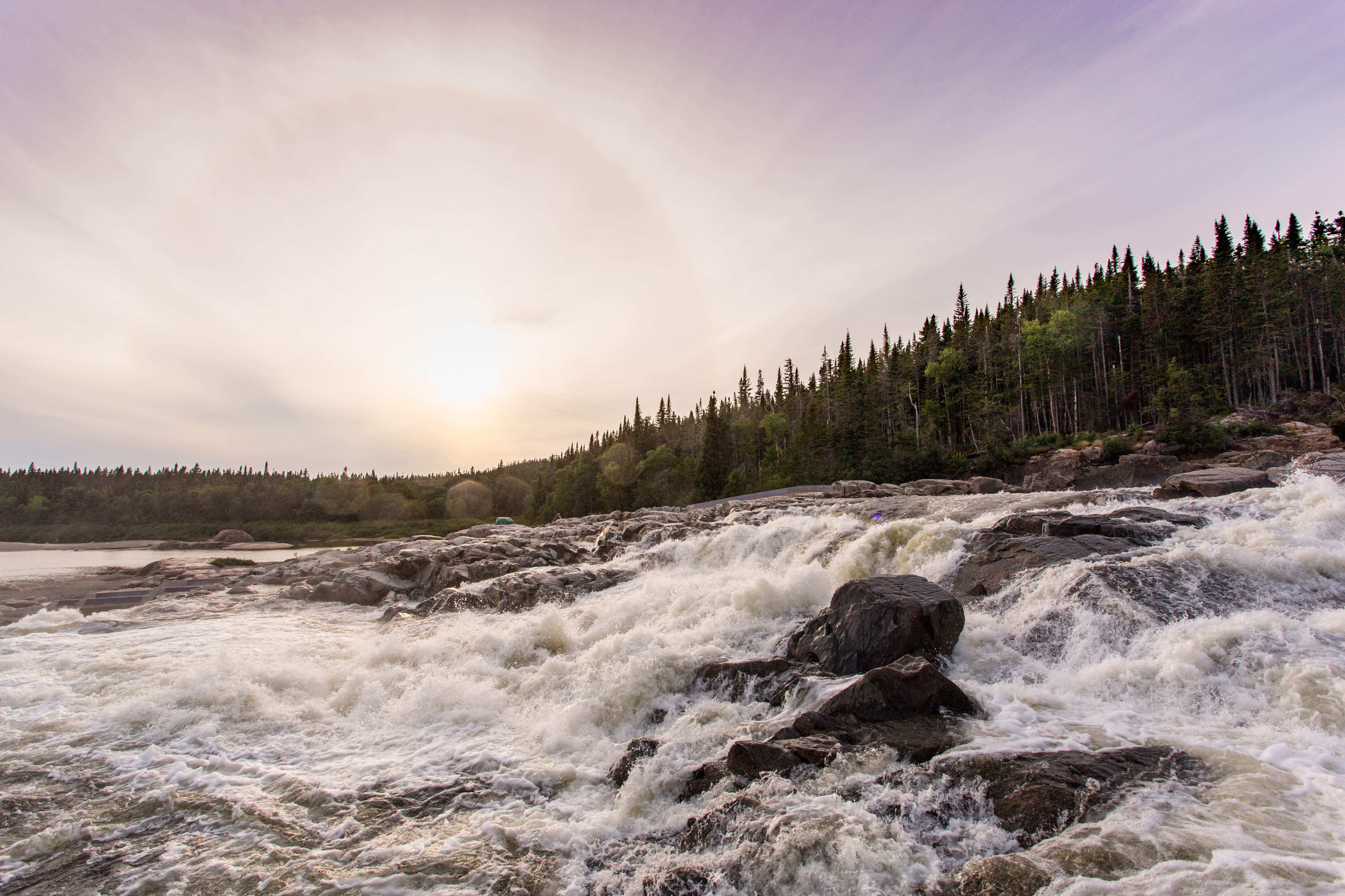 Rivières Mingan à proximité de la communauté d'Ekuanitshit